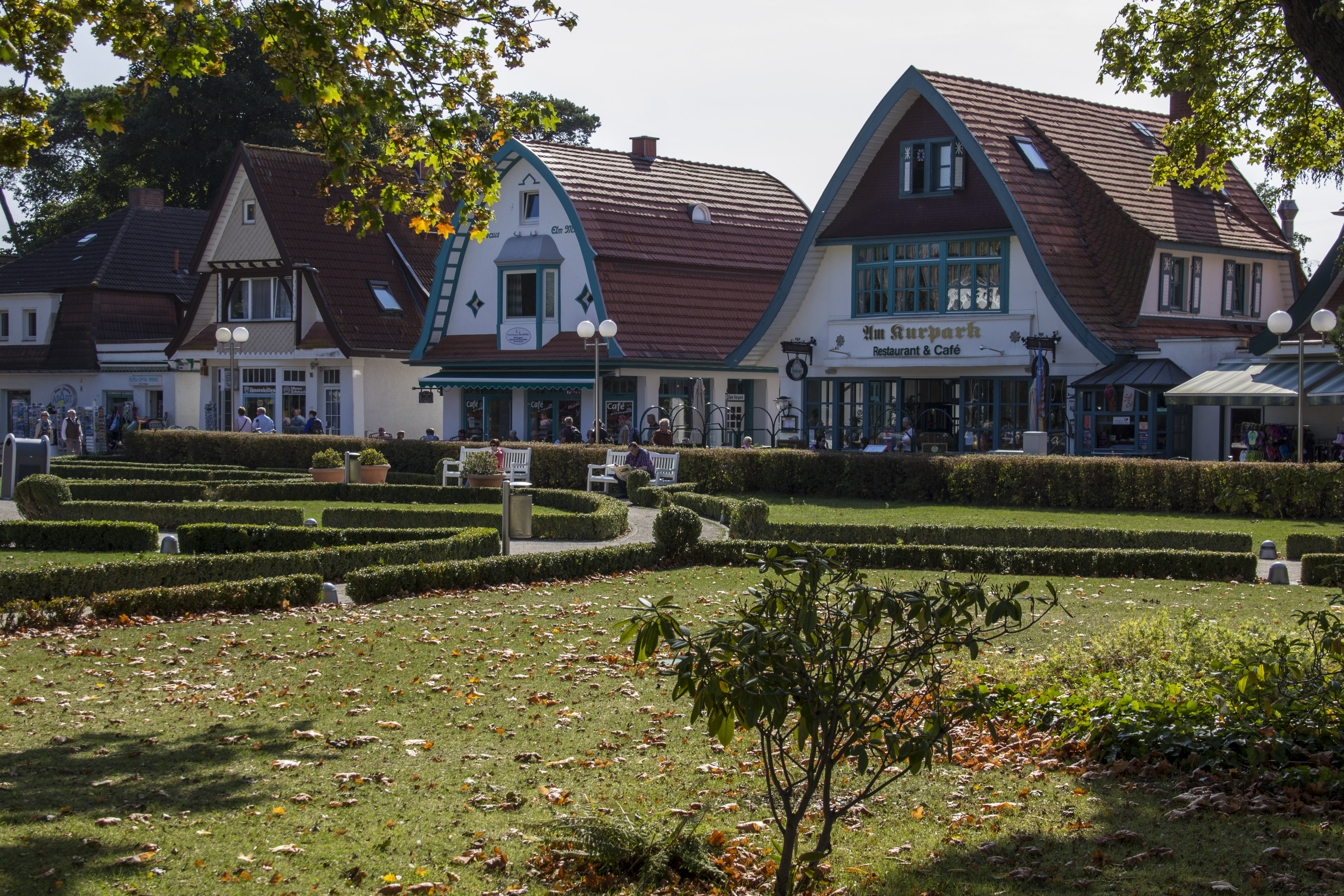 Boltenhagen, Ostsee, Ort